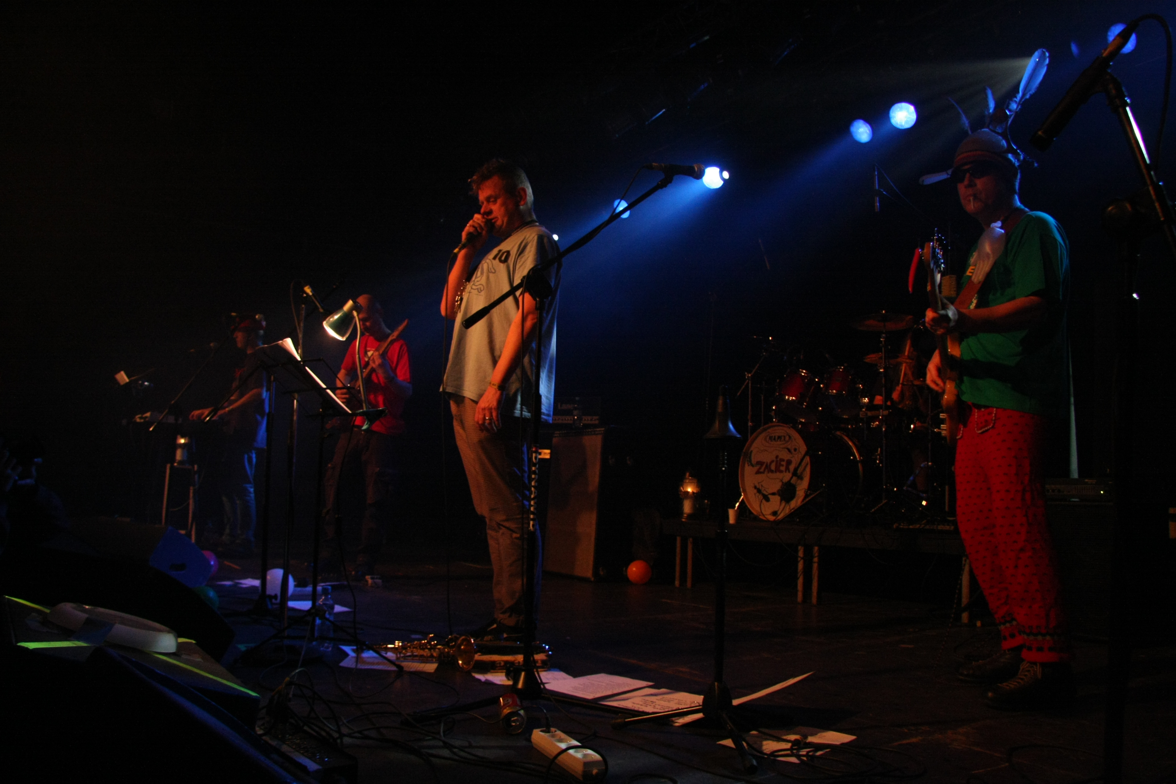 Zespół Zuch Kazik – występ w czasie Zacieralii 2013